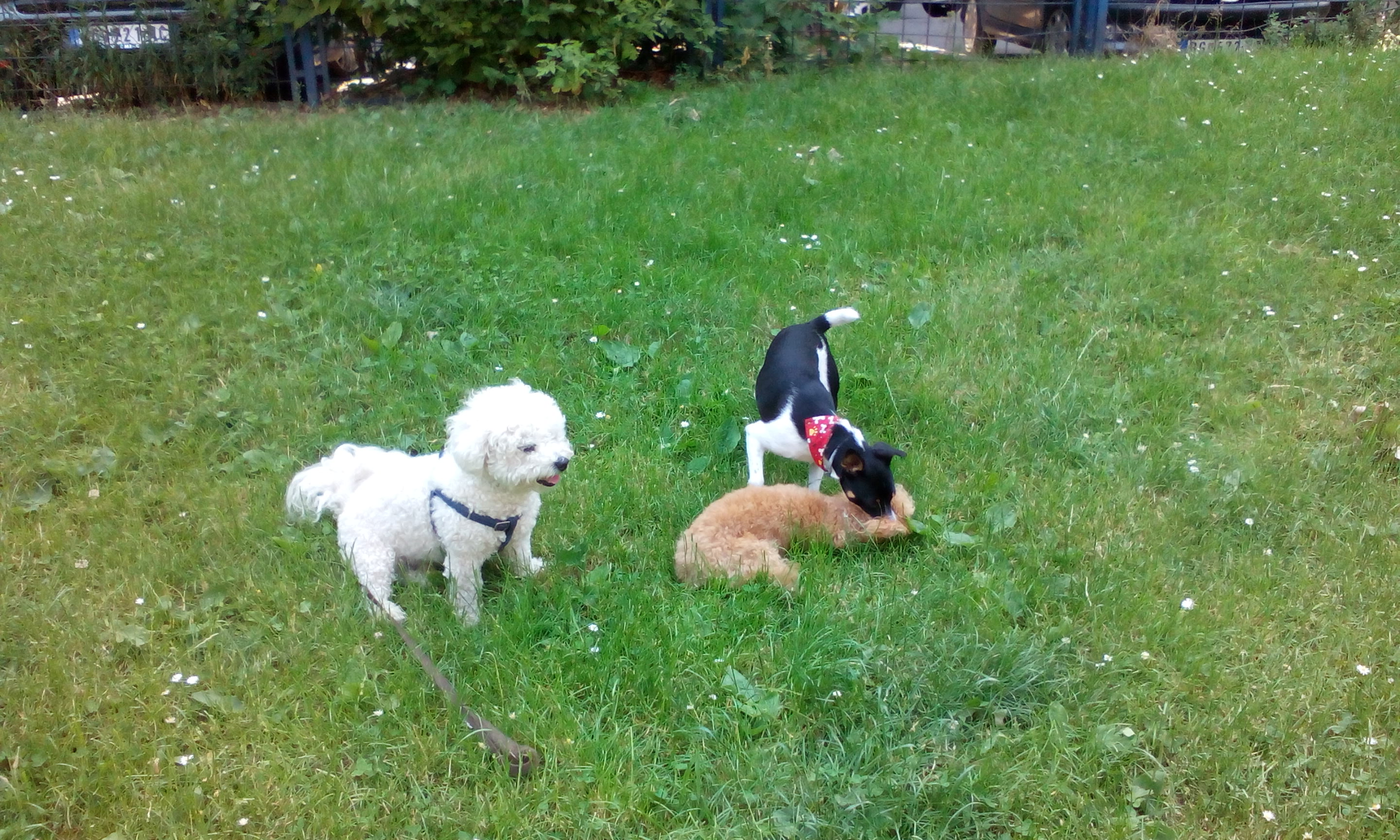 Боравак и дружење паса у парку